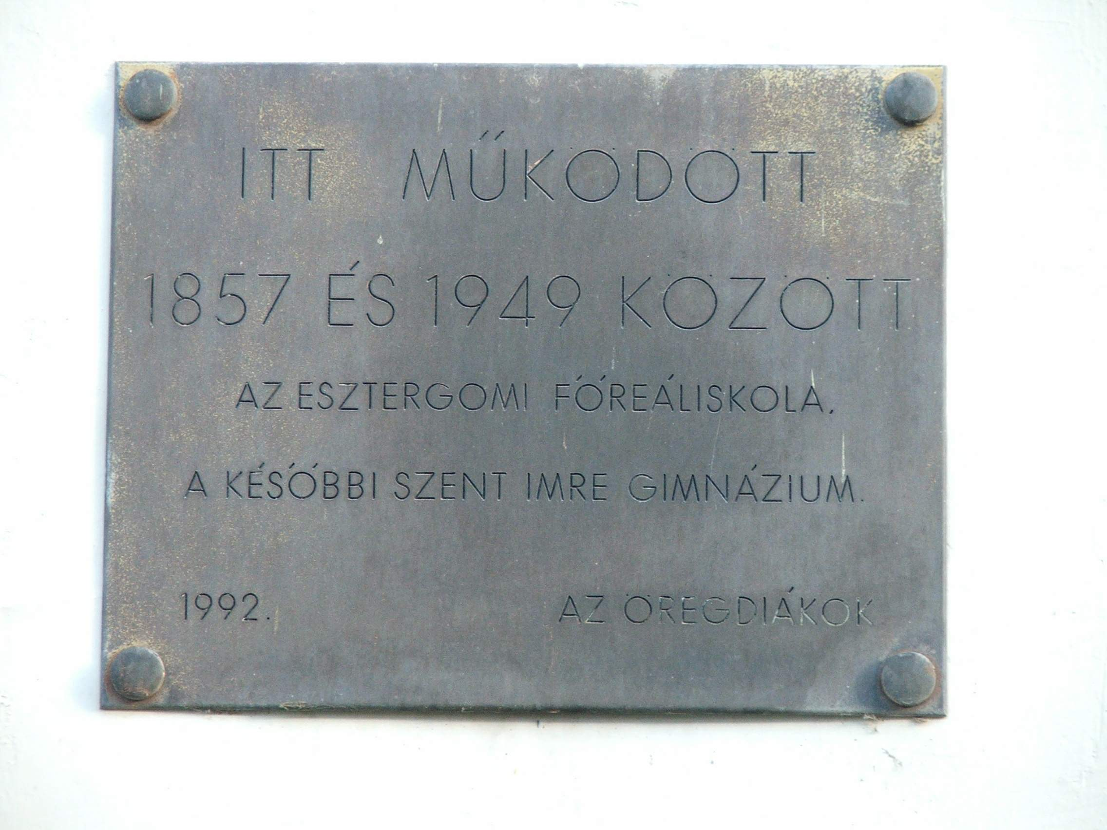 Emléktábla az egykori Szent Imre Gimnázium falán